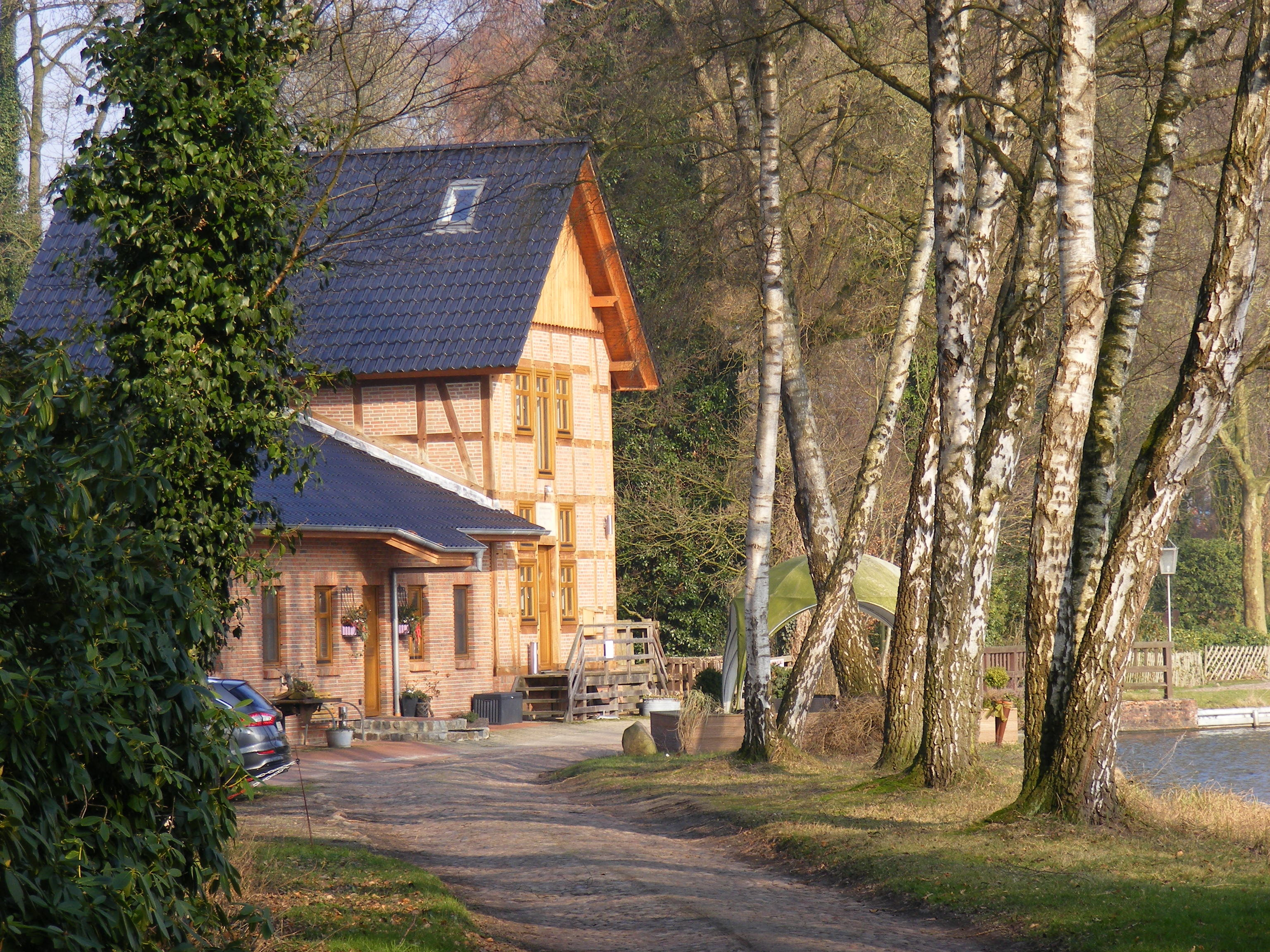 Neubau anstelle der ehemaligen Hubertusmühle in Visbek